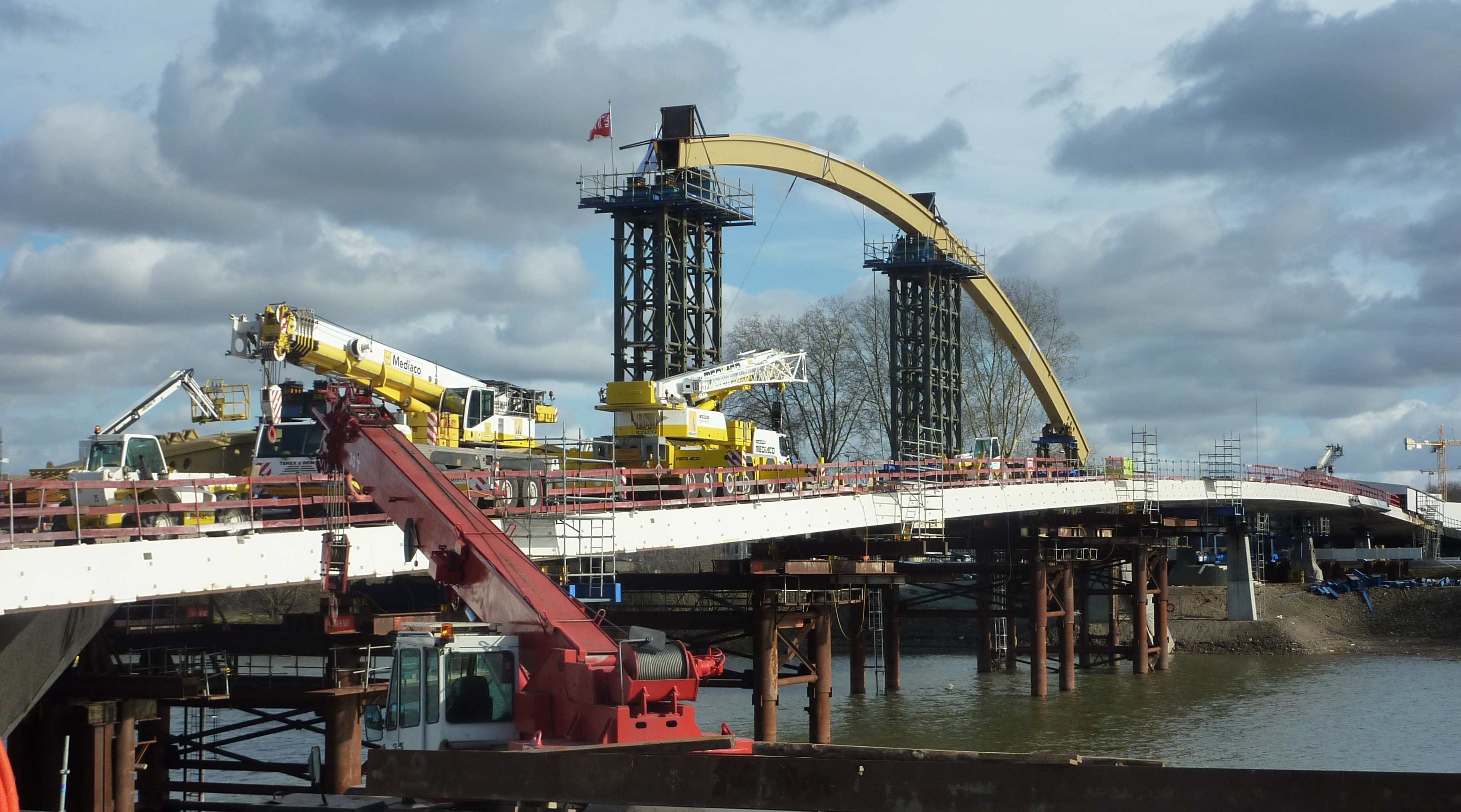 Montage de l'arche